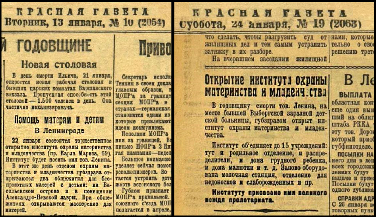 Вырезки из газет "Красная газета" за январь 1925 года с информацией об открытии института Охраны материнства и младенчества в Ленинграде 22 января 1925 года.